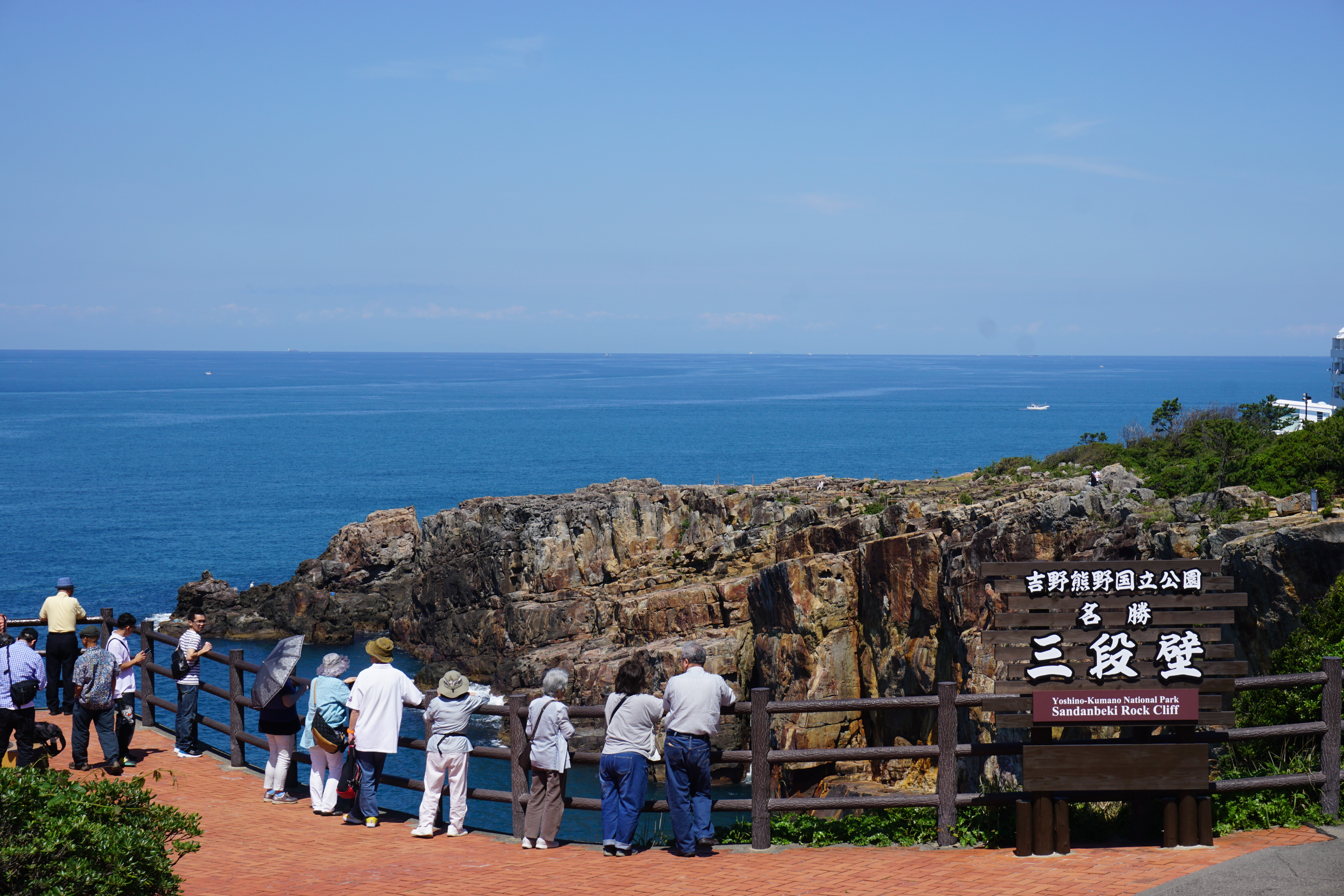 三段壁 Sony ILCE-6000